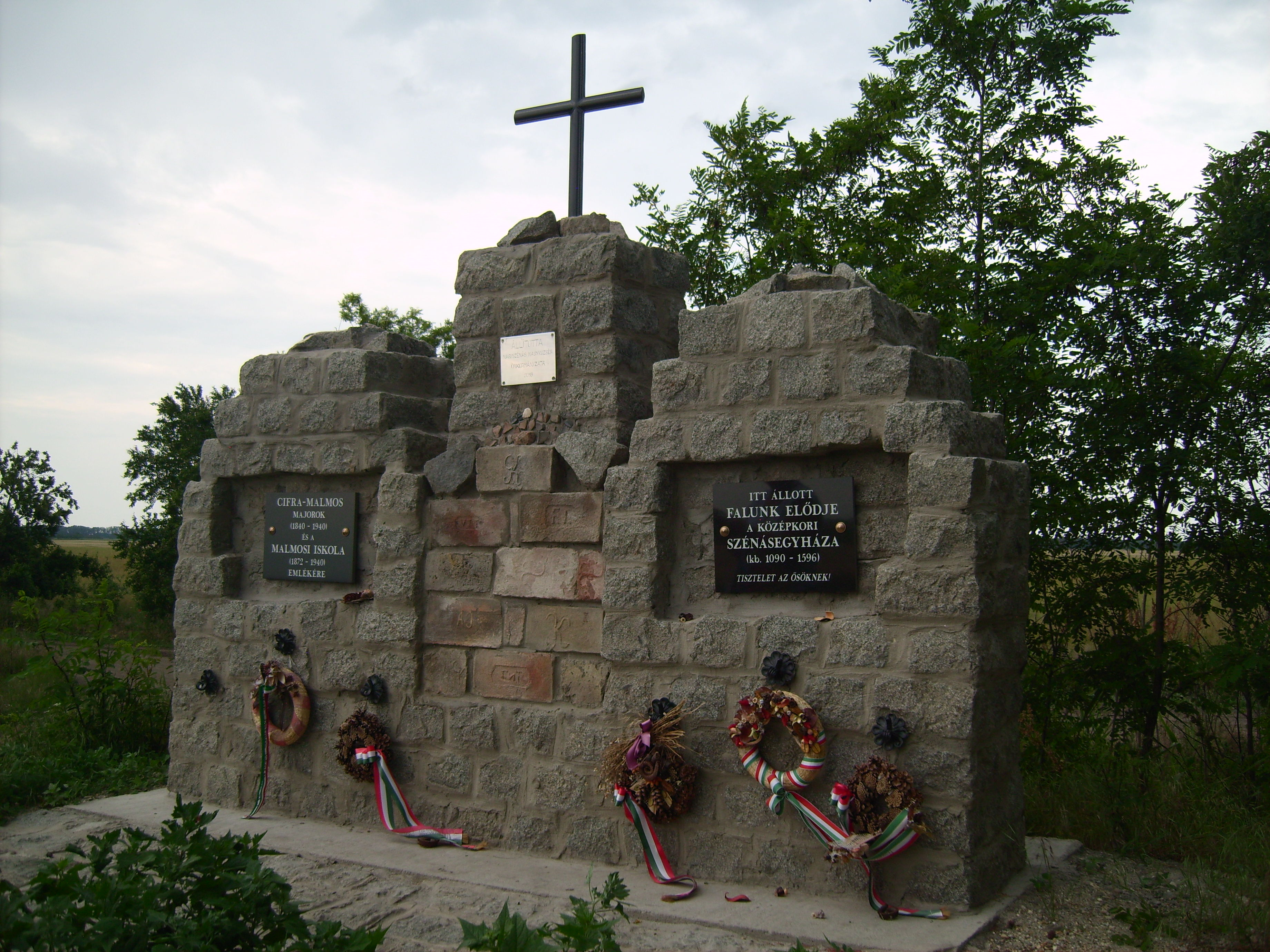 Cifra és Malmos majorok, a malmosi iskola és az ős Szénásegyháza emlékműve